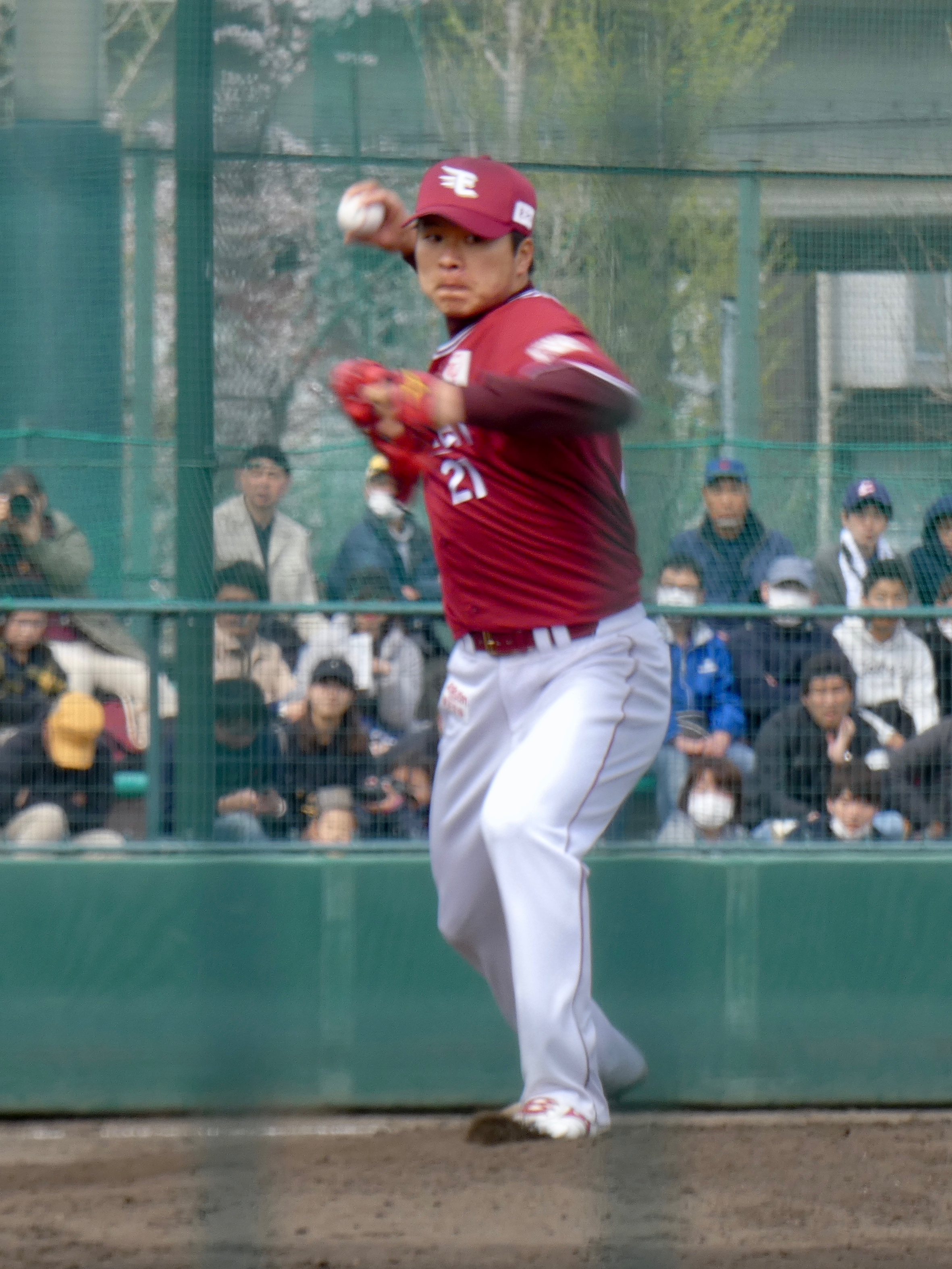 東北楽天ゴールデンイーグルスの選手「釜田佳直」。ロッテ浦和球場にて。